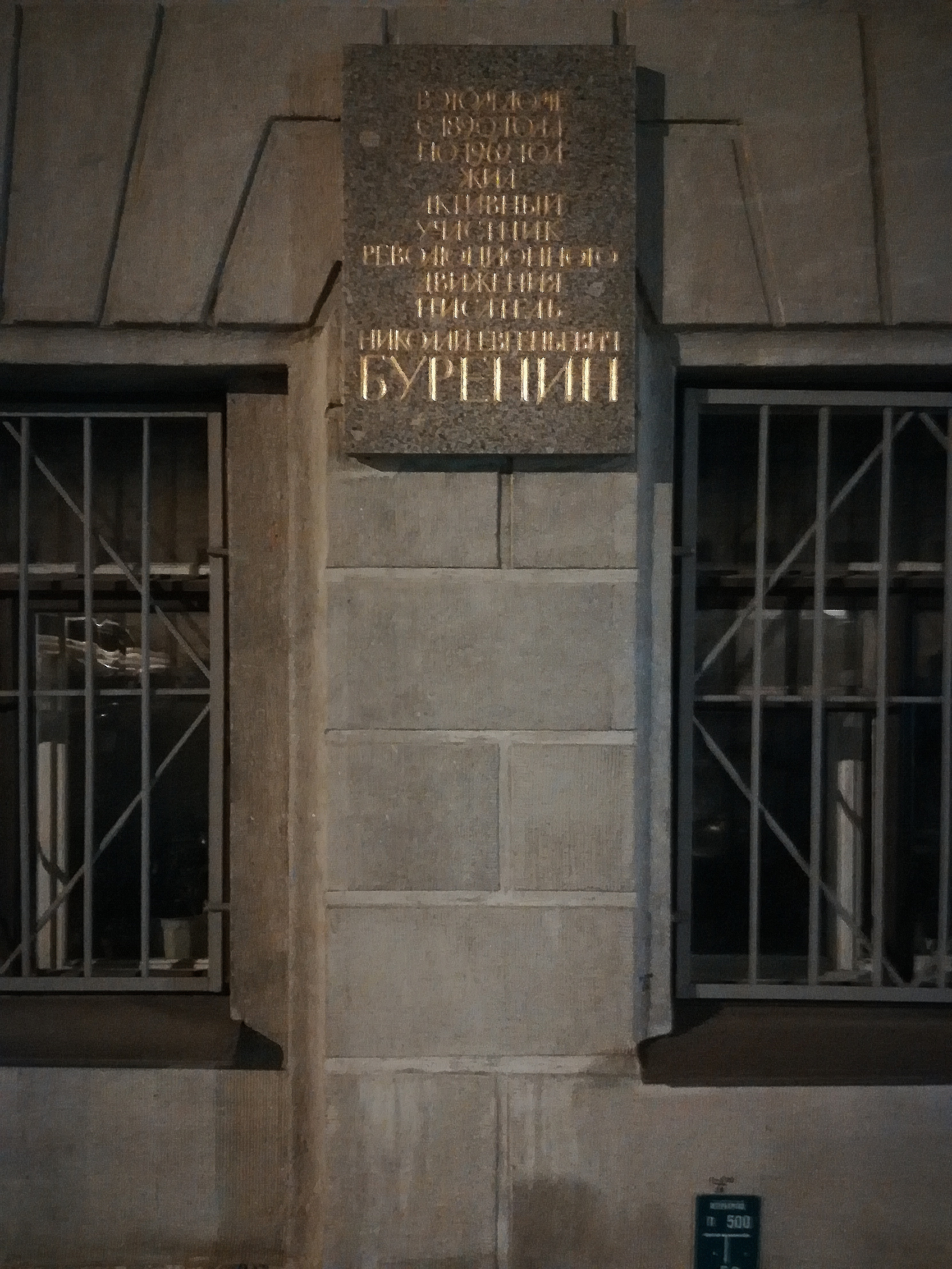 Мемориальная доска на доме № 3 Рузовской ул. в Санкт-Перебурге, где с 1890 года по 1962 год жил Николай Евгеньевич Буренин.